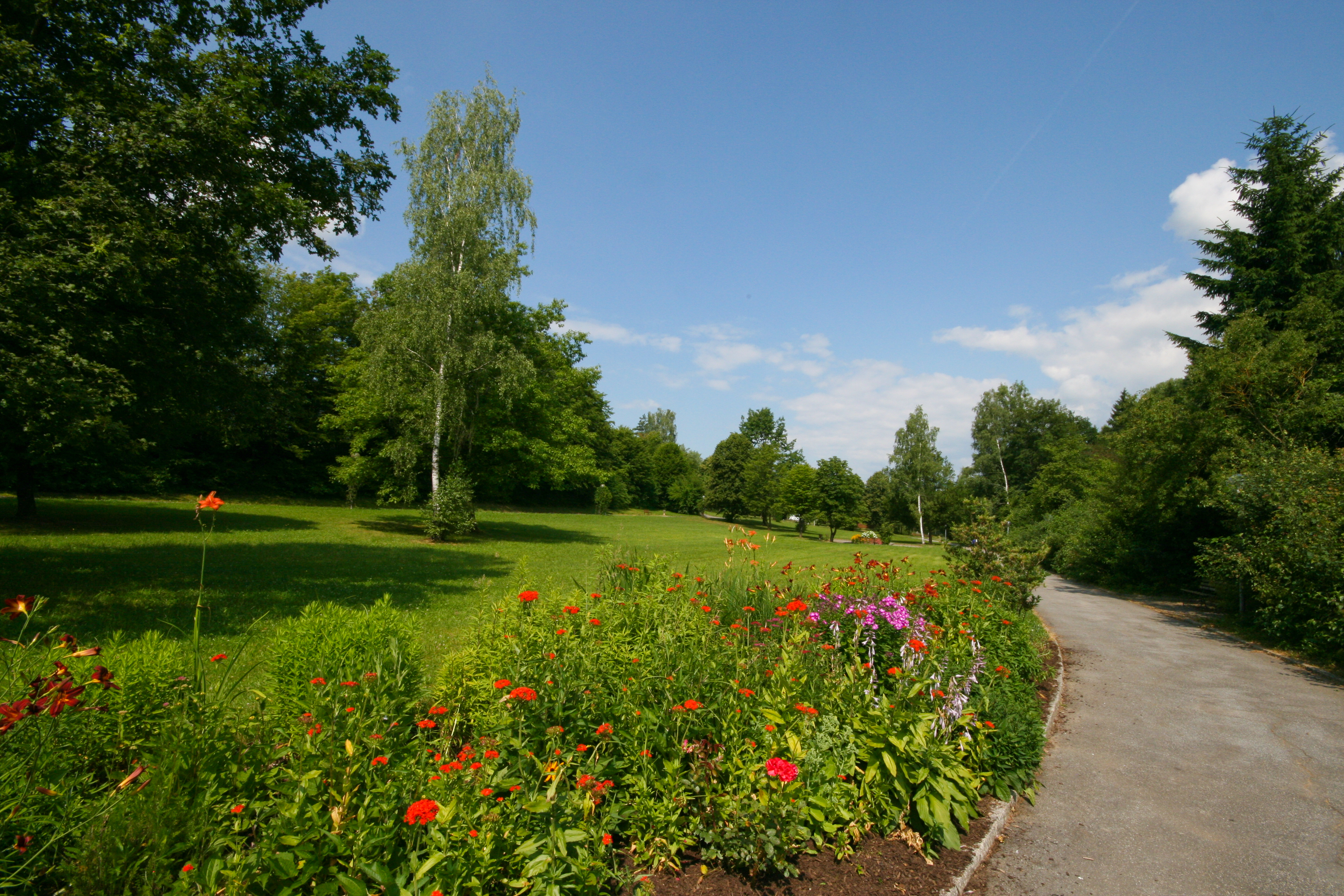 weitläufiger Kurpark in Eging am See